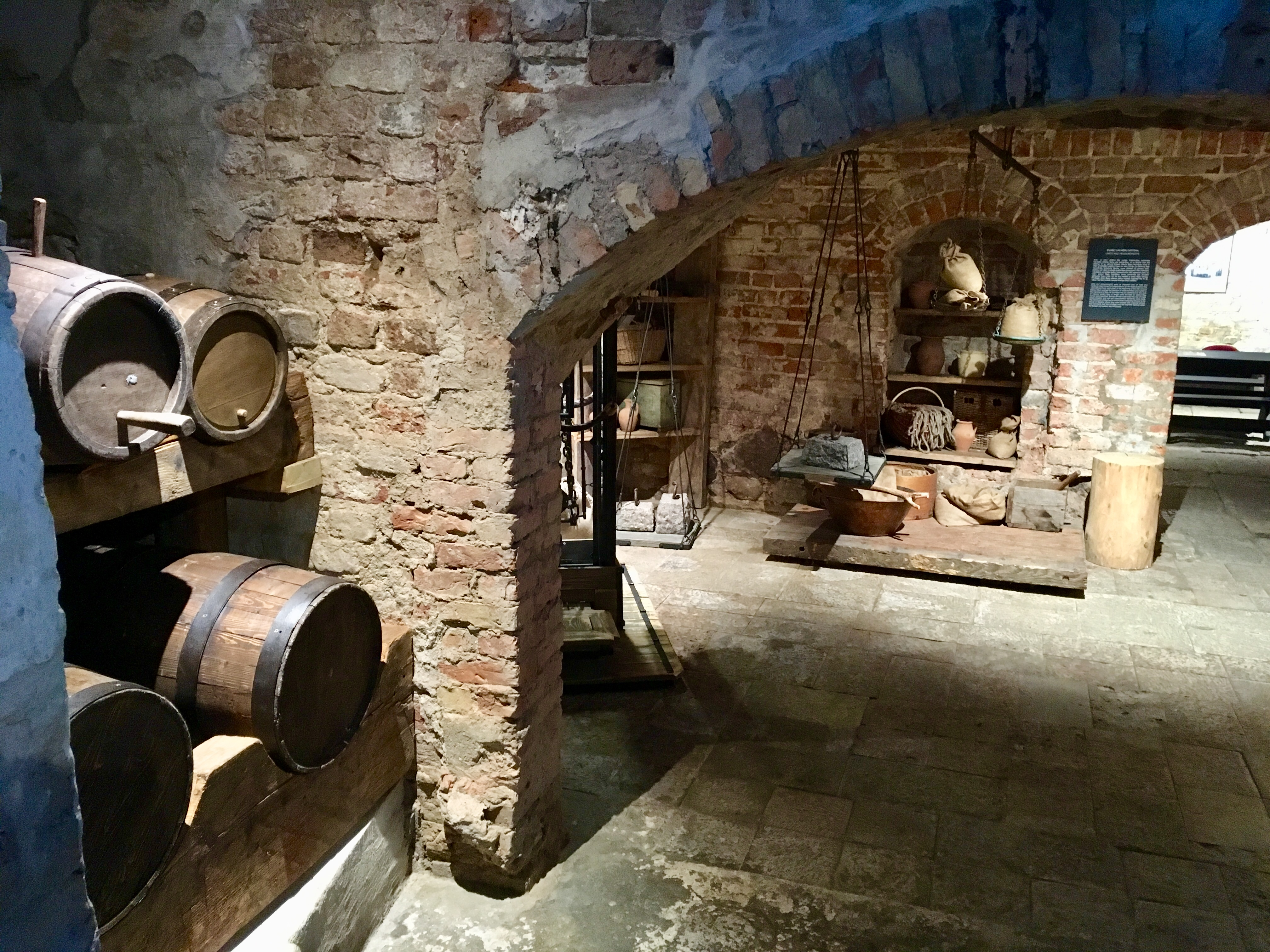 Средневековые погреба